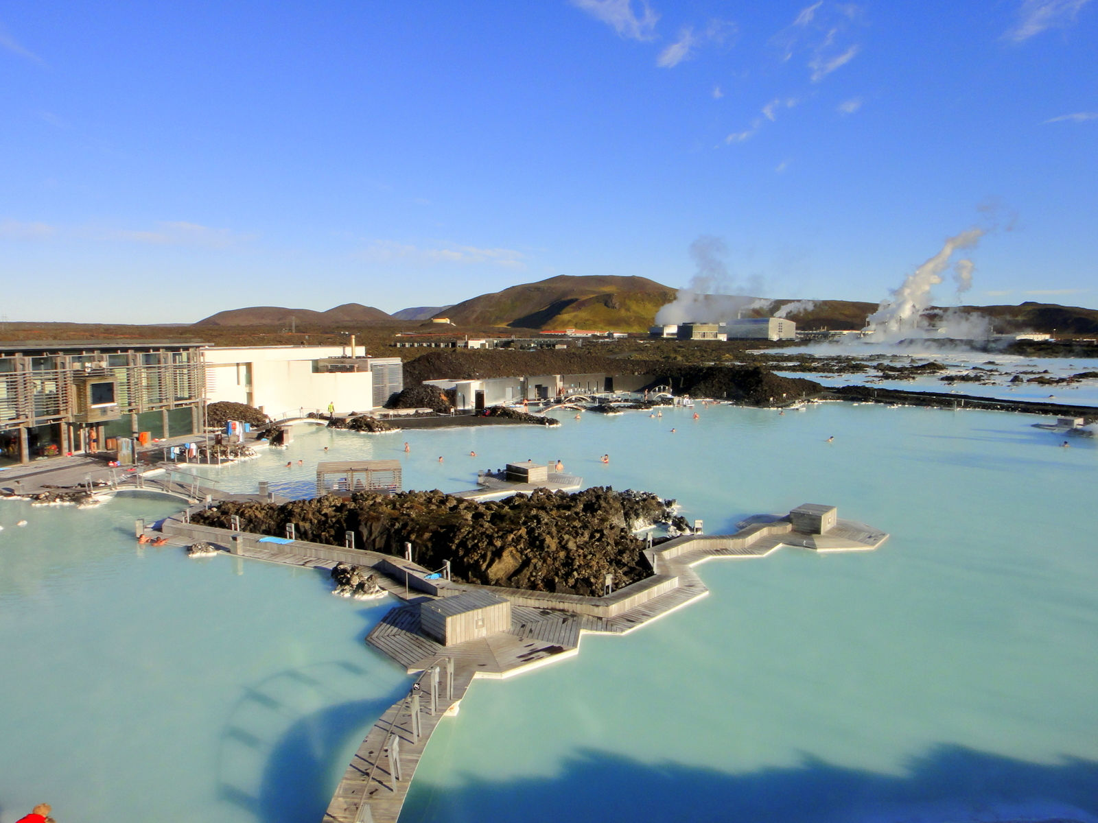 Blue lagoon, Iceland